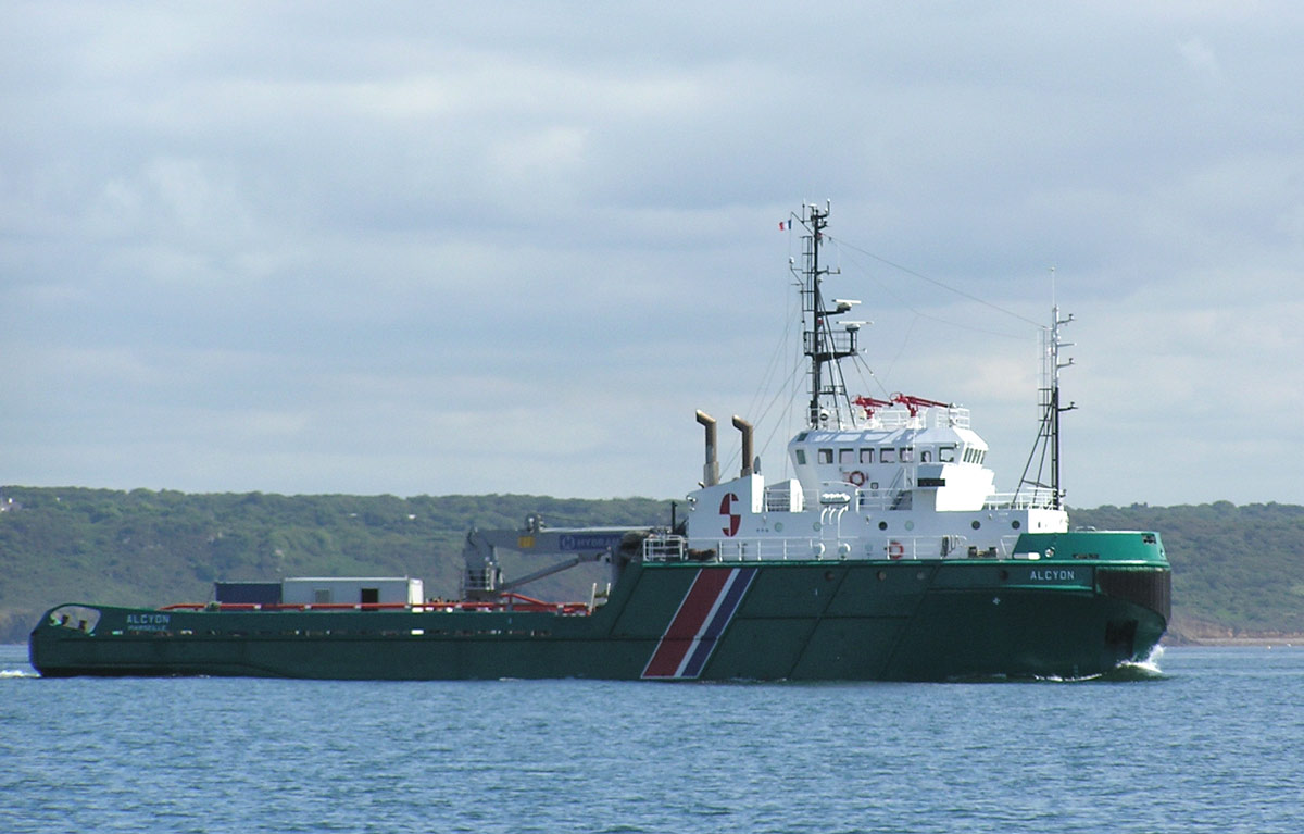 Description : Bâtiment de soutien en haute mer ALCYON dans la rade de Brest. Affrété par la Marine Nationale Française pour la lutte anti-pollution Lieu : Brest / France Date : 2005 Auteur : Pline Photo personnelle